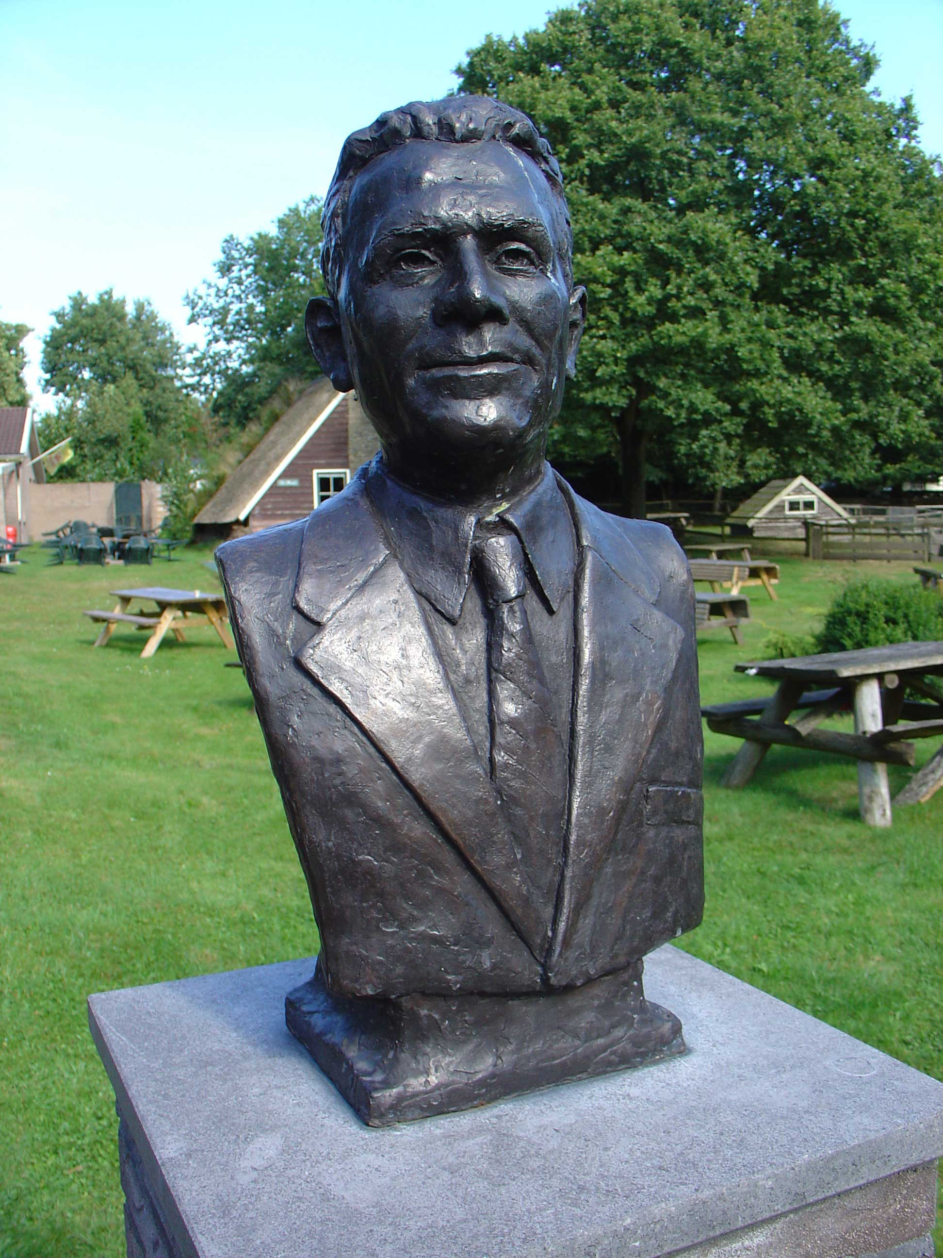 Buste van de schrijver Anne de Vries bij het streekmuseum het dorp van Bartje in Rolde